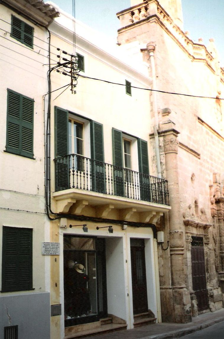 Casa natal del dibuixant del TBO Benejam.